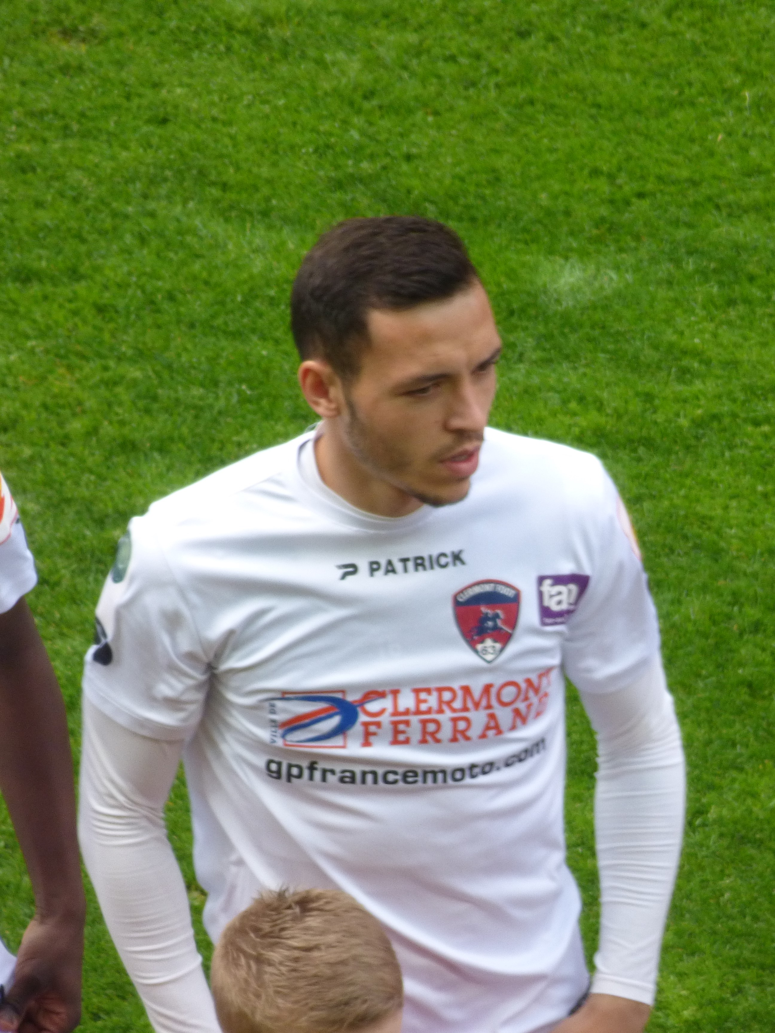 Mathias Pereira Lage avant le match RC Lens / Clermont Foot 63, comptant pour la 36ème journée du championnat de France de football de Ligue 2 2018-2019, le 4 mai 2019, au stade Bollaert-Delelis.